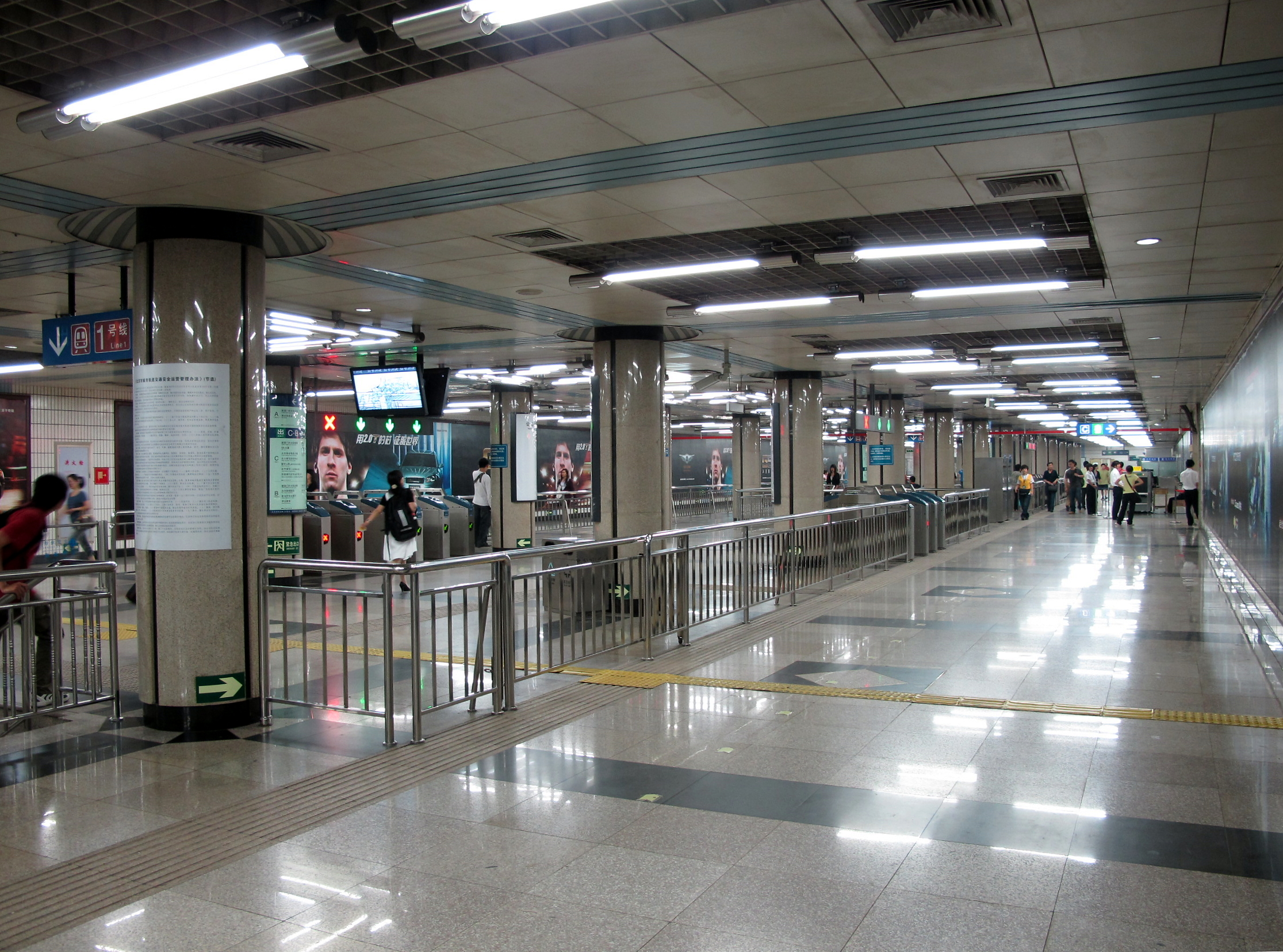 Beijing Subway Yong'anli Station 北京地鐵1號線永安里站